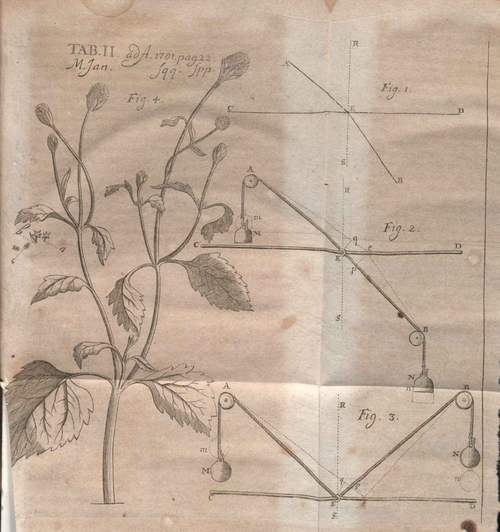 Illustration